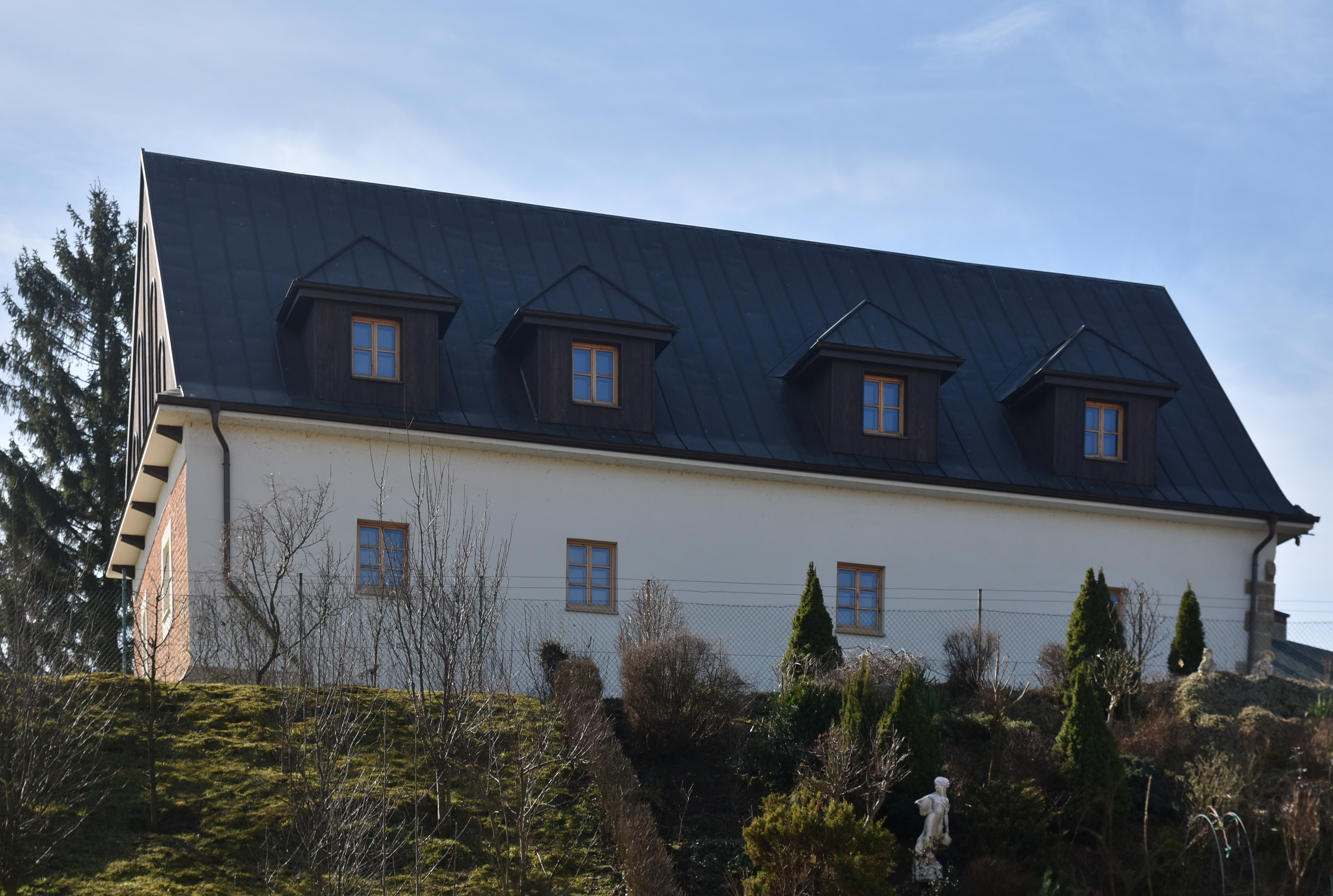 miasto Biecz